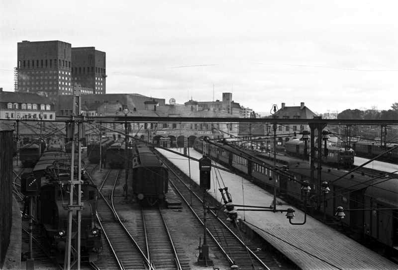 Vestbanestasjonen i Oslo, 1942.